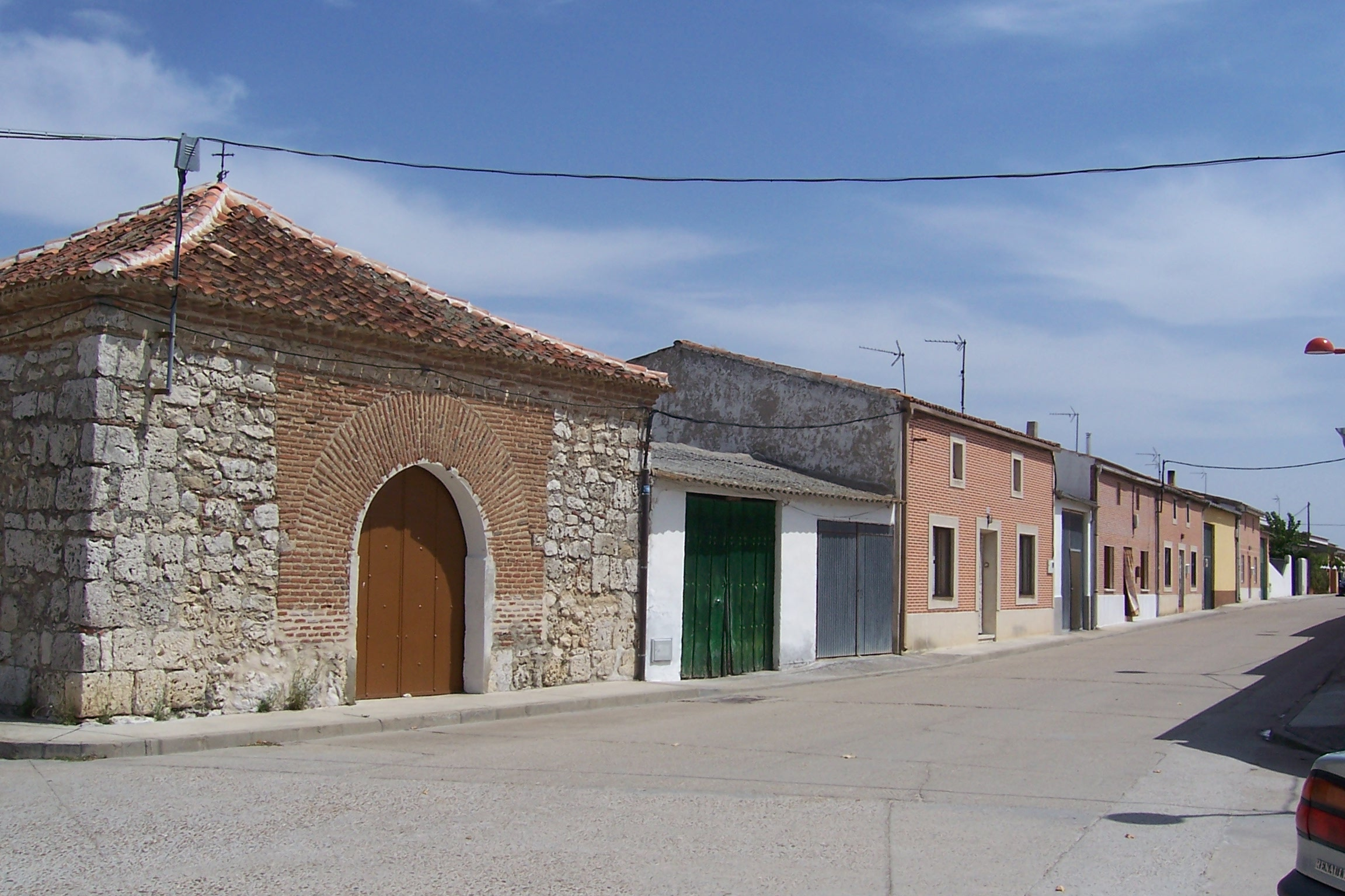 La Pedraja de Portillo, municipio de Valladolid (España). En primer término, lateral de la ermita del Cristo y junto a ella casas de arquitectura popular.